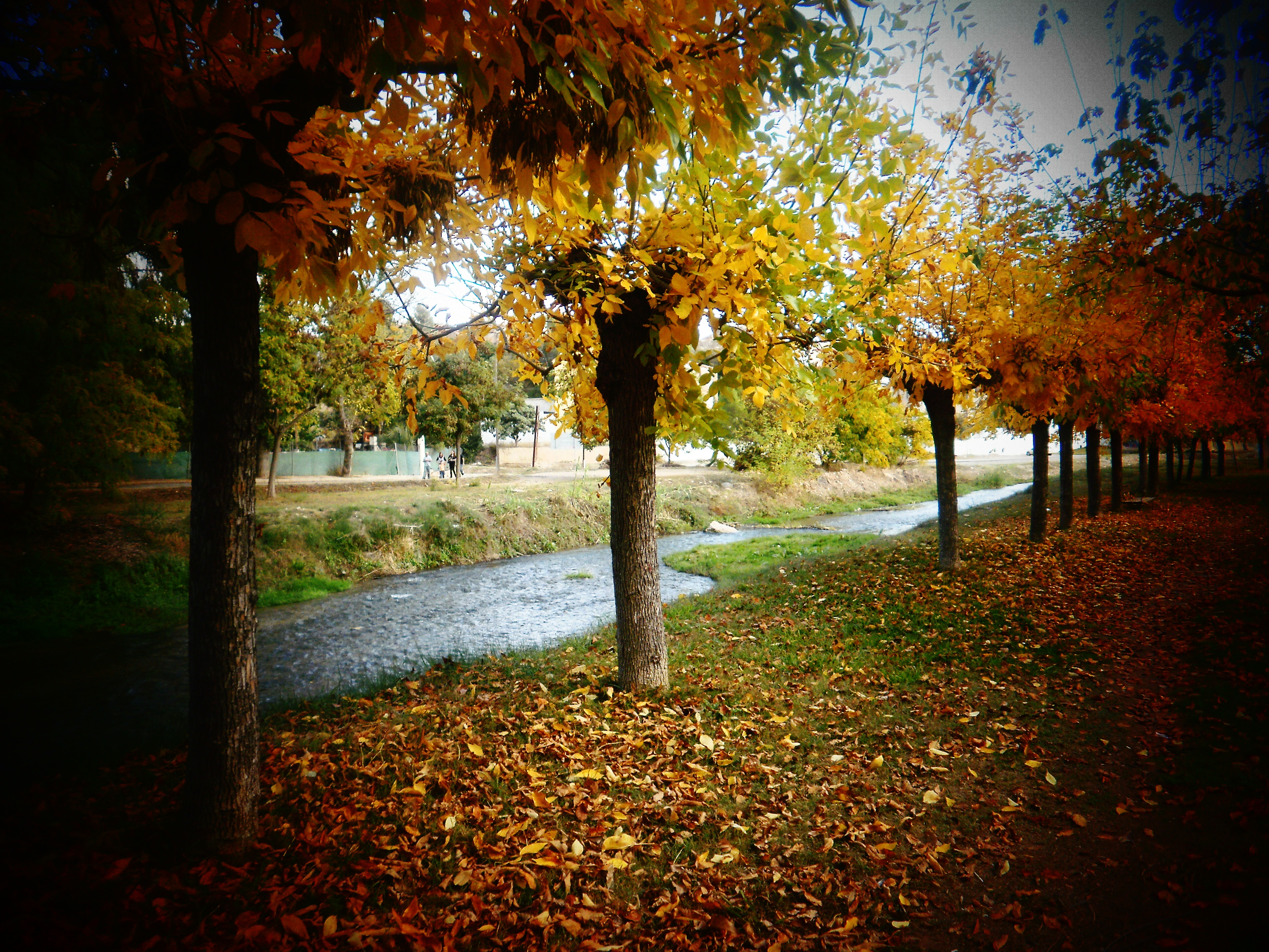 fotografía del río tuéjar a su paso por calles